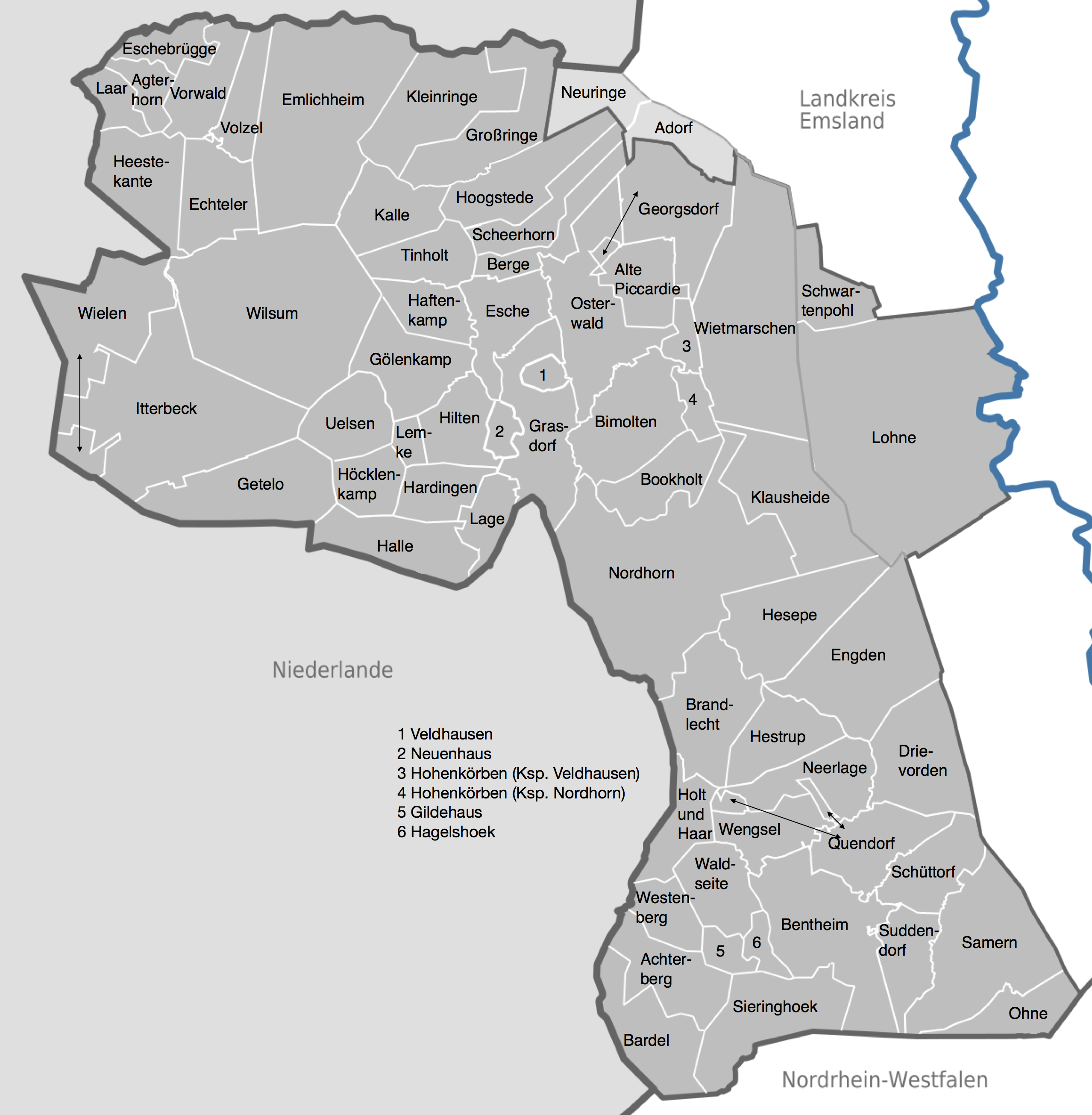 Karte des Landkreises Grafschaft Bentheim mit den Gemeindegrenzen vor 1970